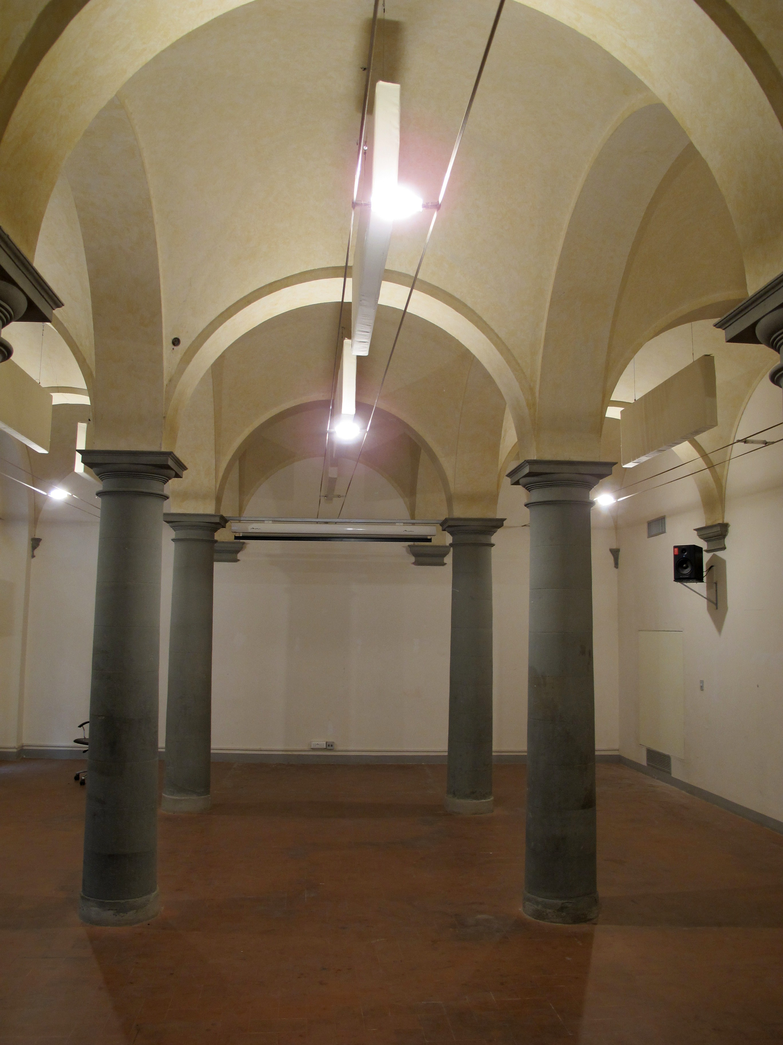 Sala Laura Orvieto o delle Colonne